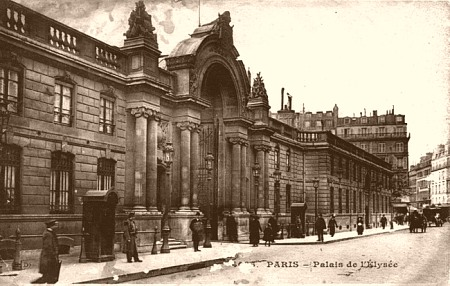 Palais de l'Elysée entrance